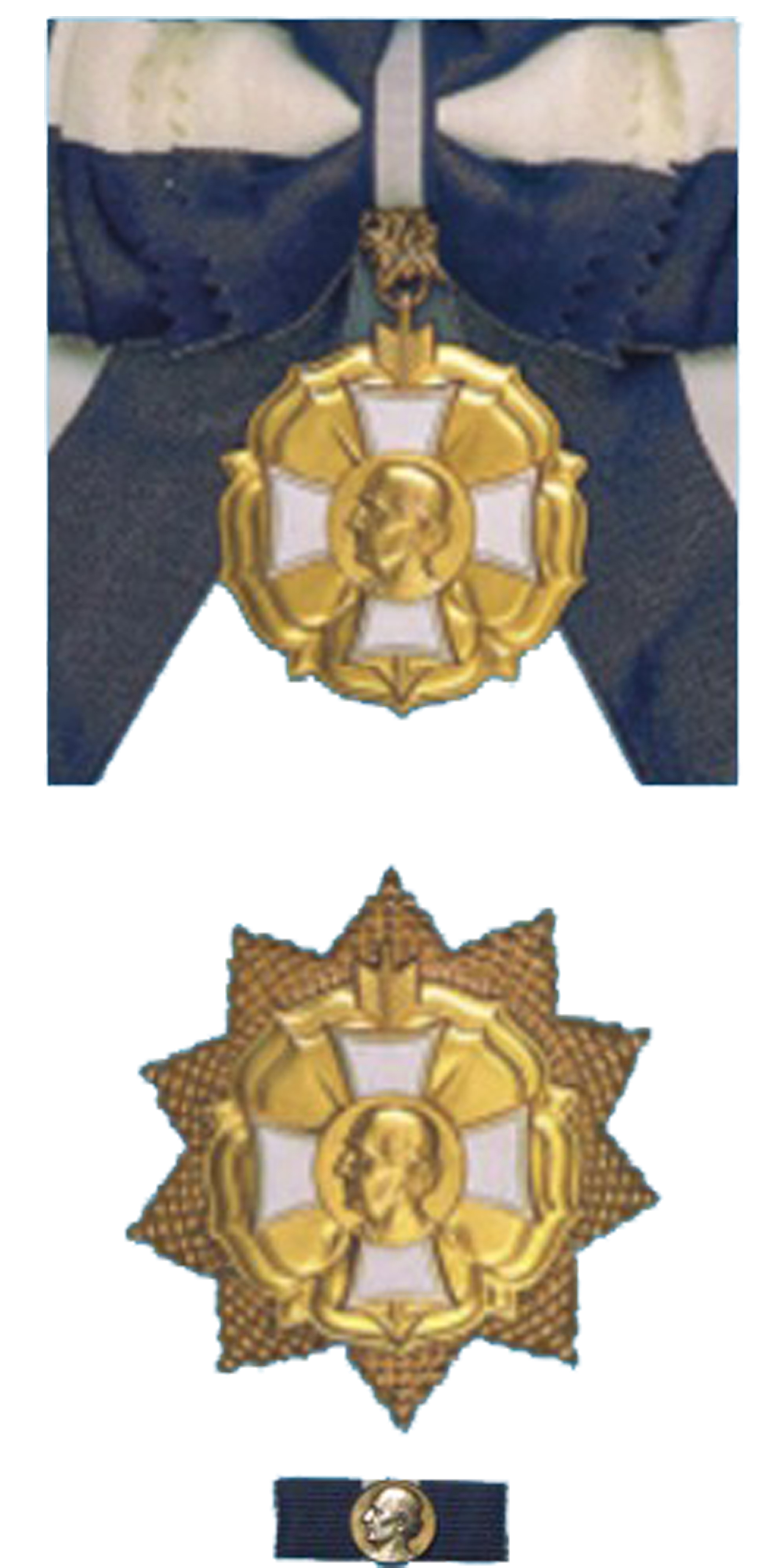 Rad Andreja Hlinku 1. triedy Insígnie I. triedy tvorí: radový kríž, veľká radová stuha, radová hviezda, radová stužka a radová rozeta. Radový kríž má priemer 65 mm, je razený zo striebra, pozlátený. Veľká radová stuha je hodvábna, modro-bielo-modrá, s pomerom farieb 3/8:2/8:3/8, dlhá 180 cm, široká 90 mm. Radová hviezda má priemer 90 mm, je razená zo striebra, pozlátená. Má tvar desaťcípej hviezdy. Radová stužka je hodvábna, modro-bielo-modrá, s rovnakým pomerom farieb, dlhá 18 mm, široká 10 mm. V strede radovej stužky je zo striebra razený, pozlátený medailón s plastickým profilom Andreja Hlinku, s priemerom 12 mm.